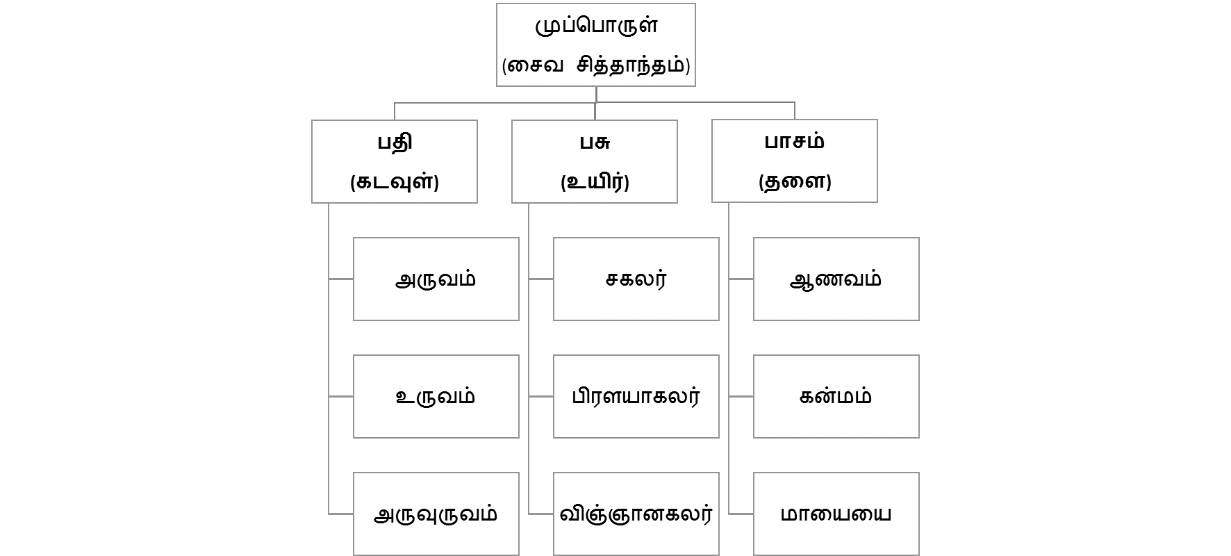 முப்பொருள் (சைவம்)